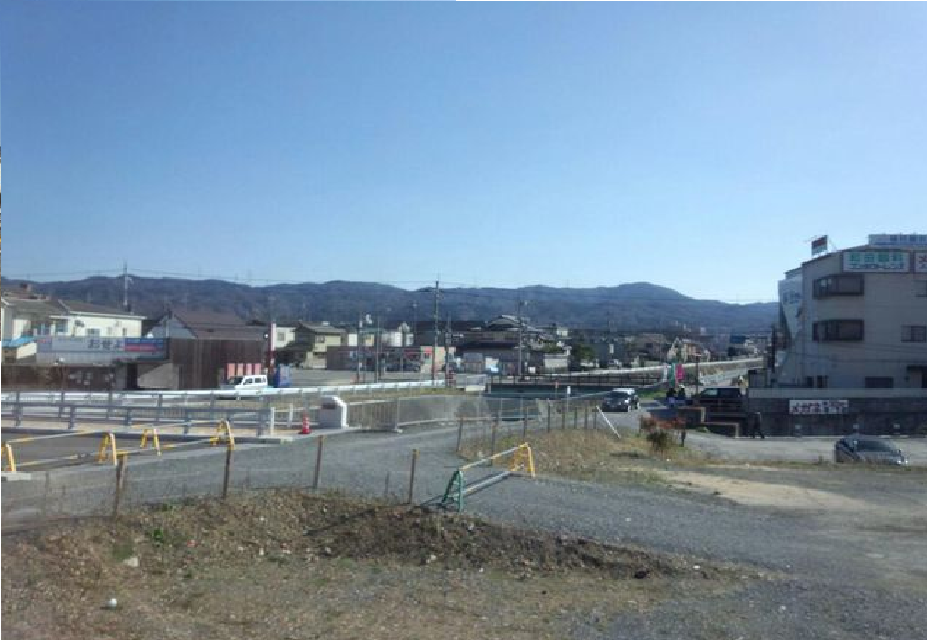 嵯峨野線の電車より遠望した明神ヶ岳と黒柄山